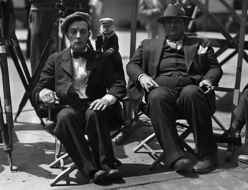 Комик Buster Keaton (1895–1966) в Чикаго с обезьянкой и режиссером Edward Sedgwick (1893–1953) на съемках “The Cameraman”. 1928